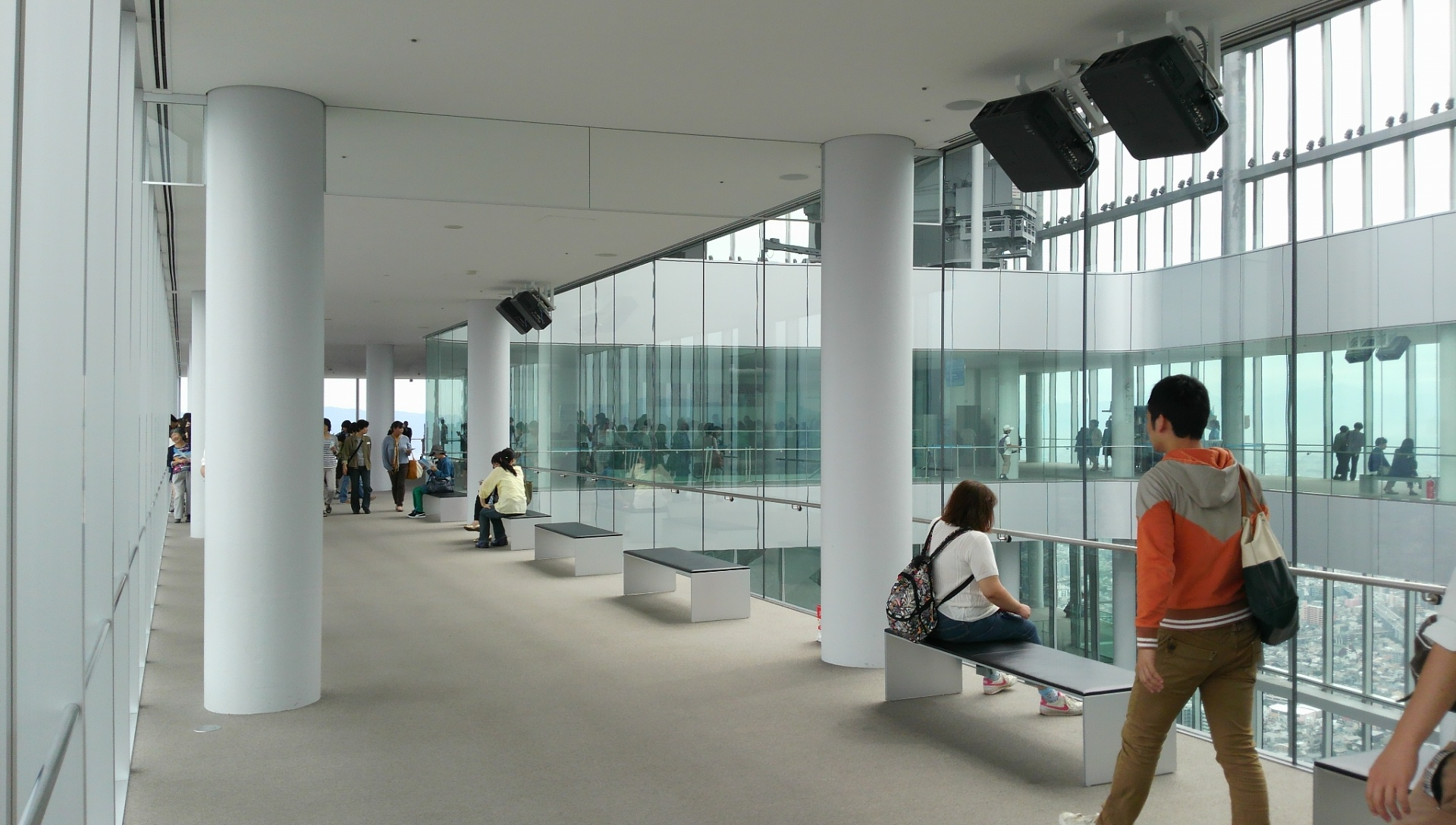 大阪市阿倍野区に位置するあべのハルカス60階内部。